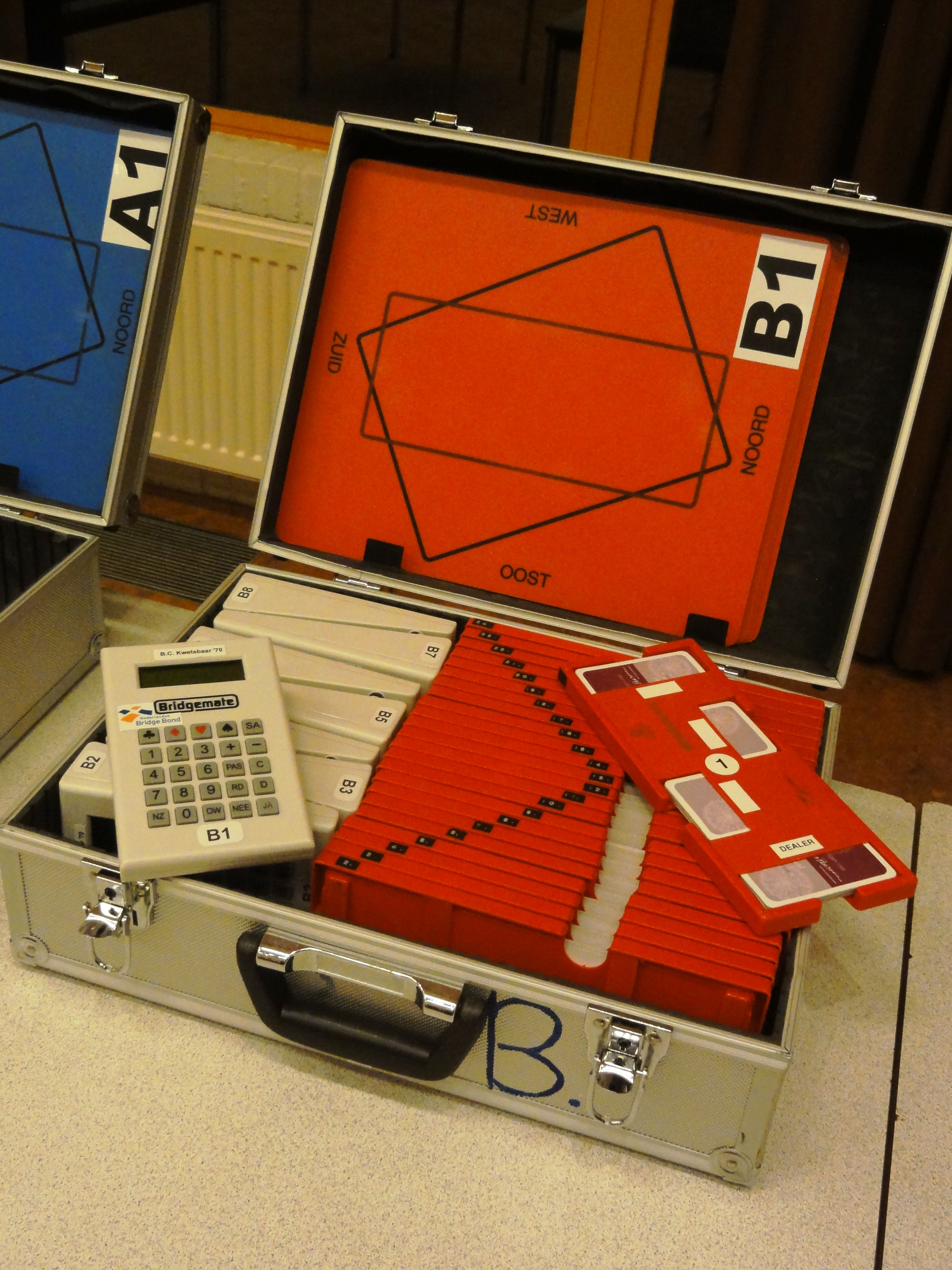 Bridge spellenkoffer voor een B-lijn met 28 kaartboards, 8 bridgemates en 8 tafelborden